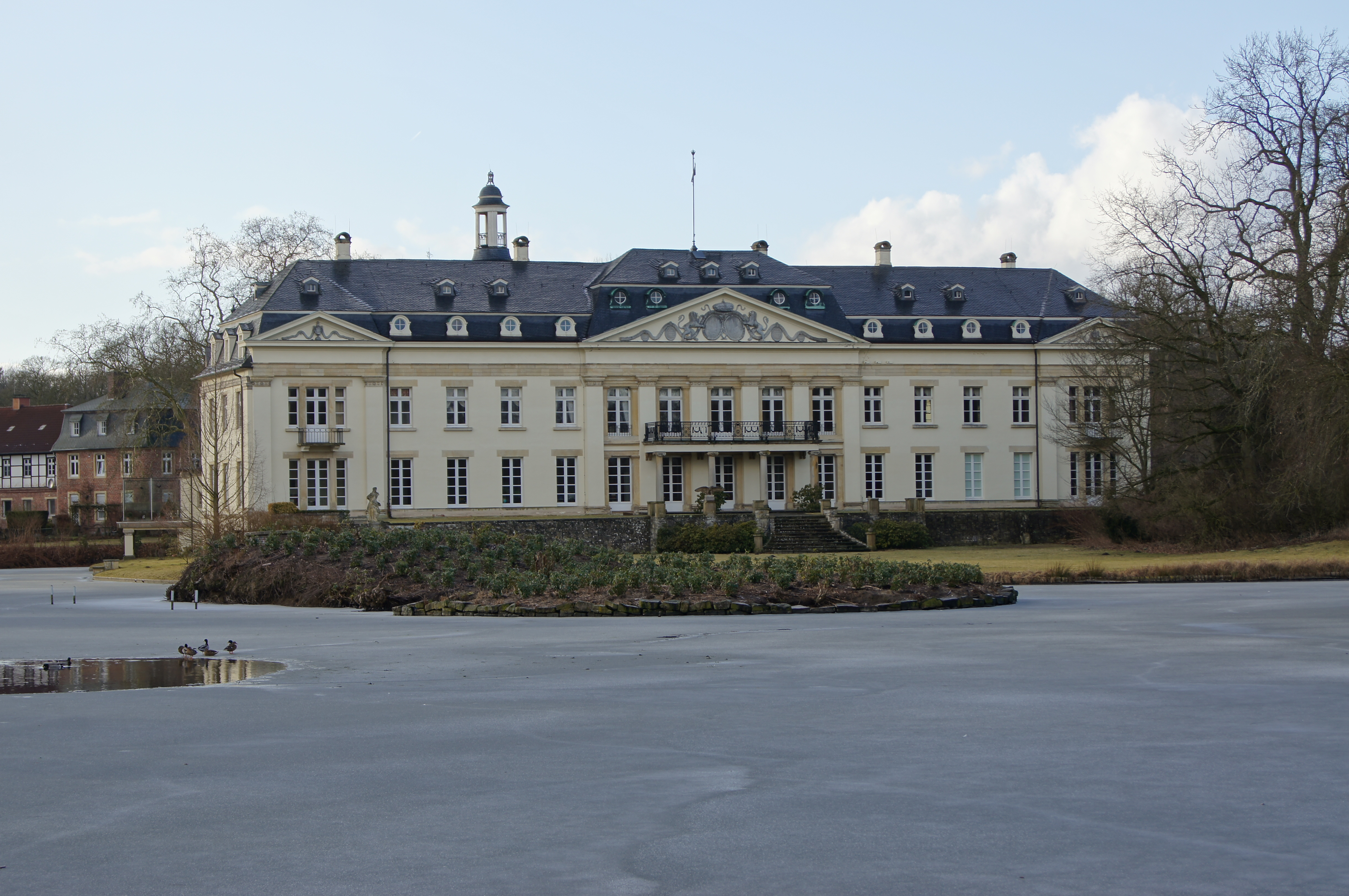 Schloss Varlar zwischen Coesfeld und Osterwick gesehen von den rückwärtigen Parkanlagen.